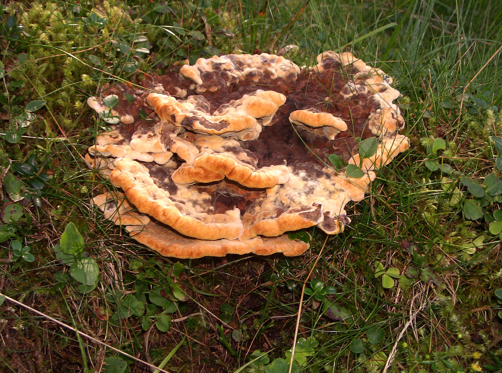 Phaeolus schweinitzii - Bellamonte (TN), Italy - 08/2006 - foto personale - (c) B.Baldassari